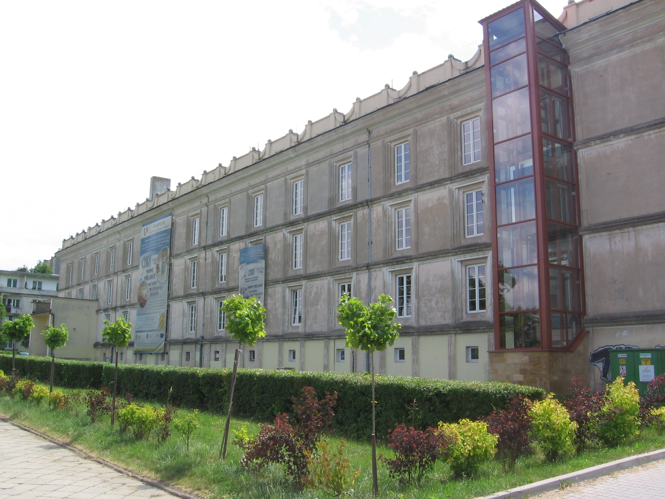 Wydział Pedagogiczny i Artystyczny UJK w Kielcach przy ul. Krakowskiej.